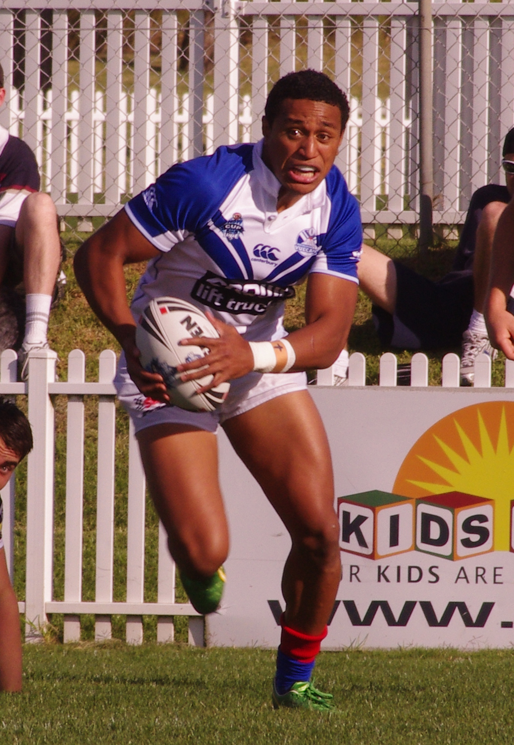 Glen fisiiahi